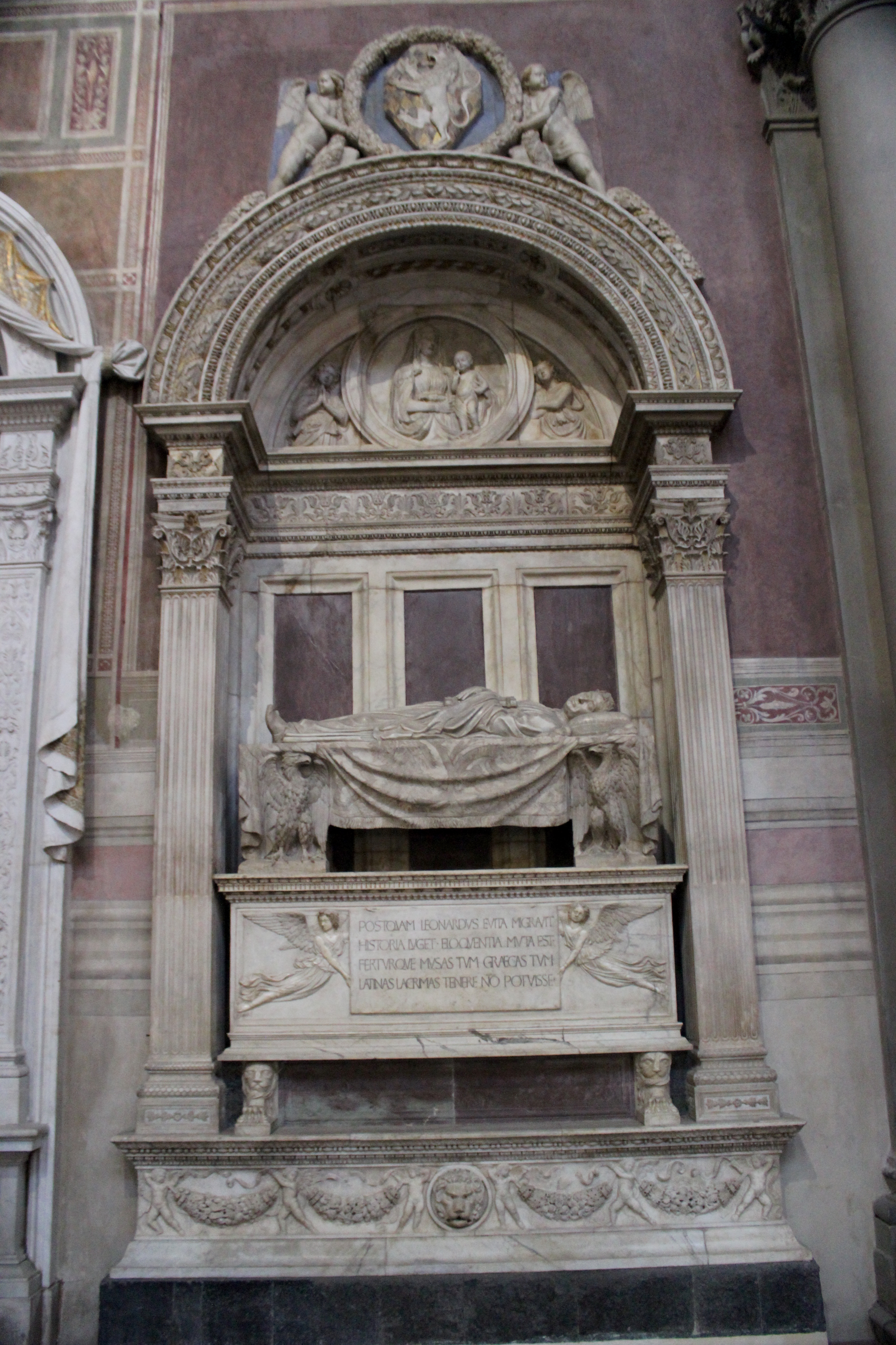 Florencia. Santa Croce. Tumba de Leonardo Bruni.